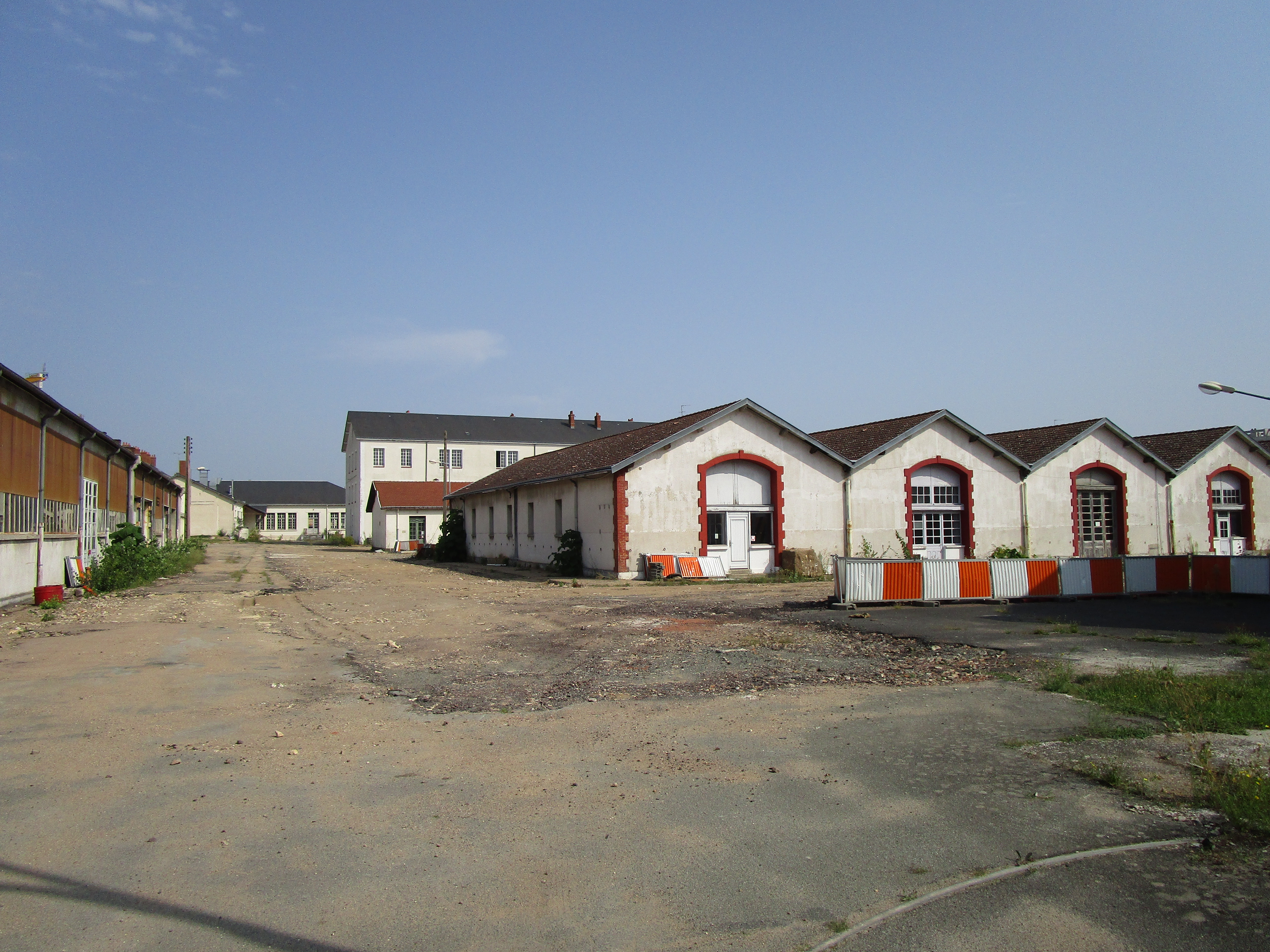 L'ancienne caserne Beaumont de Tours.